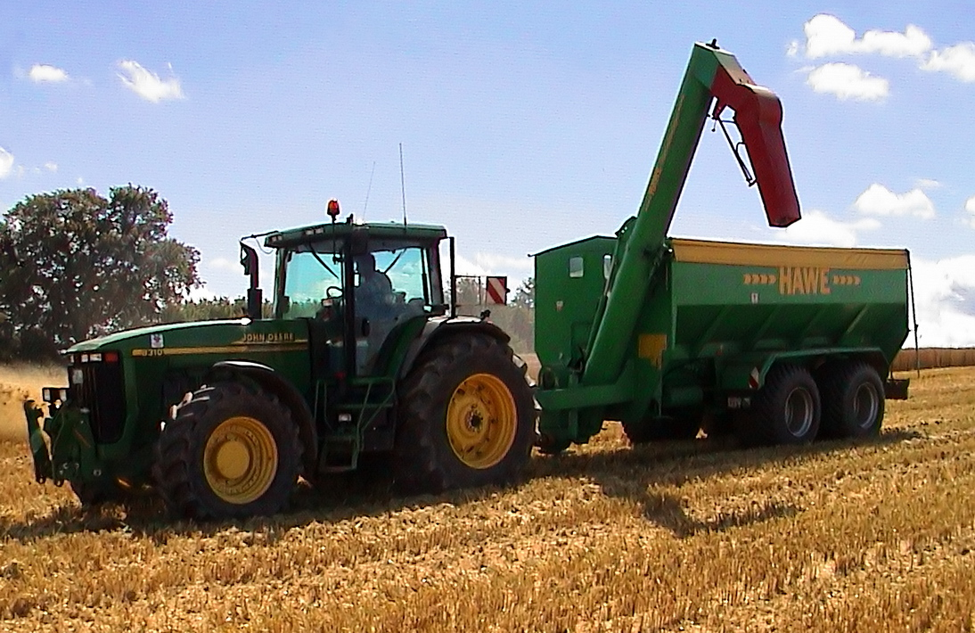 Traktor John Deere 8310 vor HAWE-Überladewagen mit Tandemfahrwerk und Saatgutrutsche (Abtankrohr)